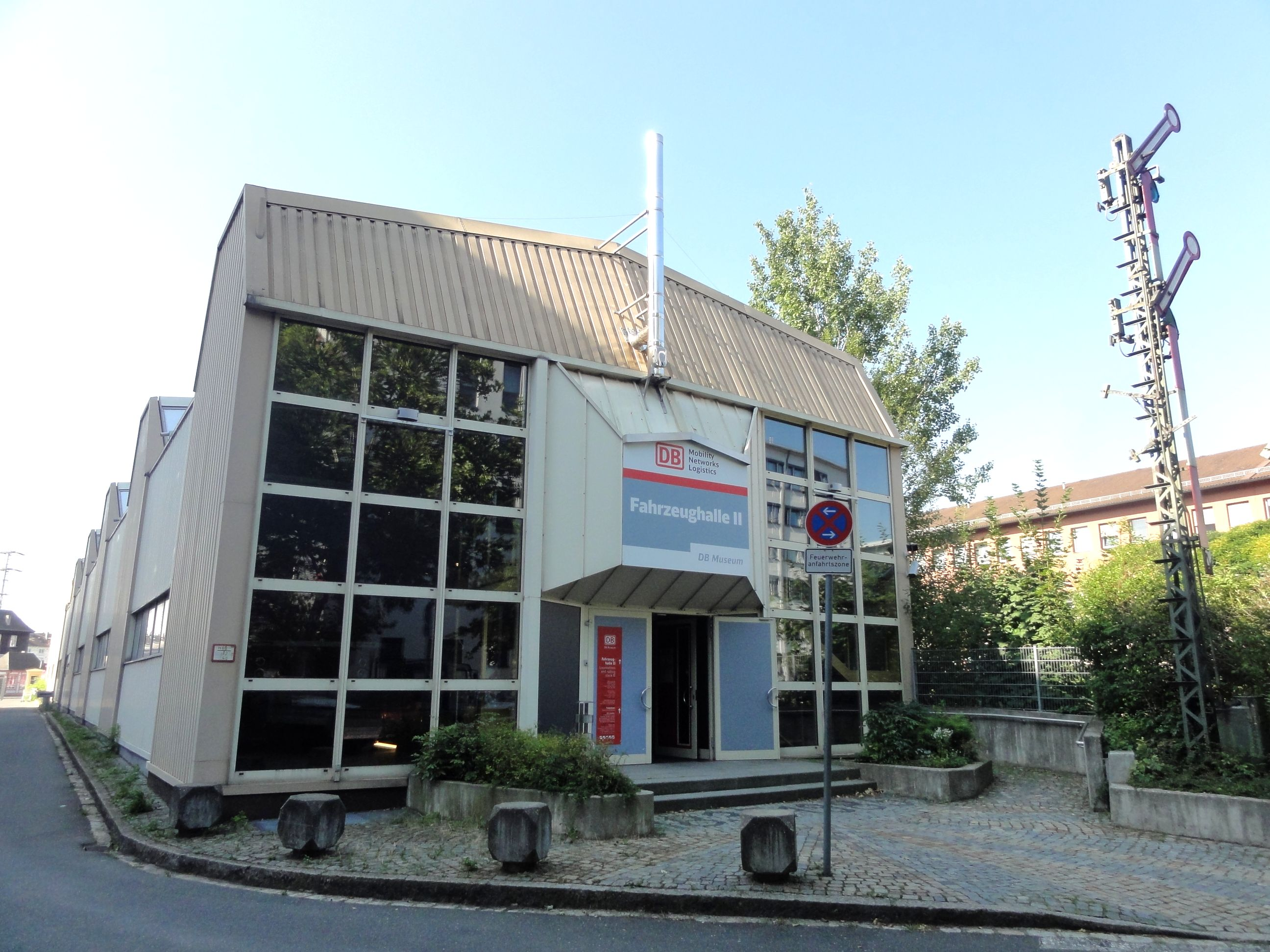 DB Museum Nurnberg Halle 2